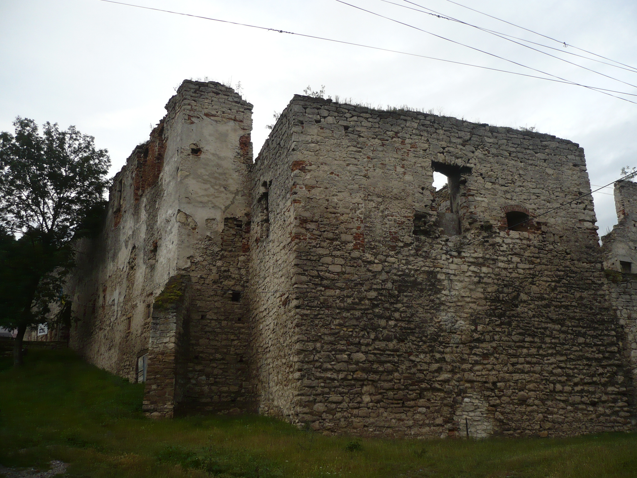 Czortków. Zamek